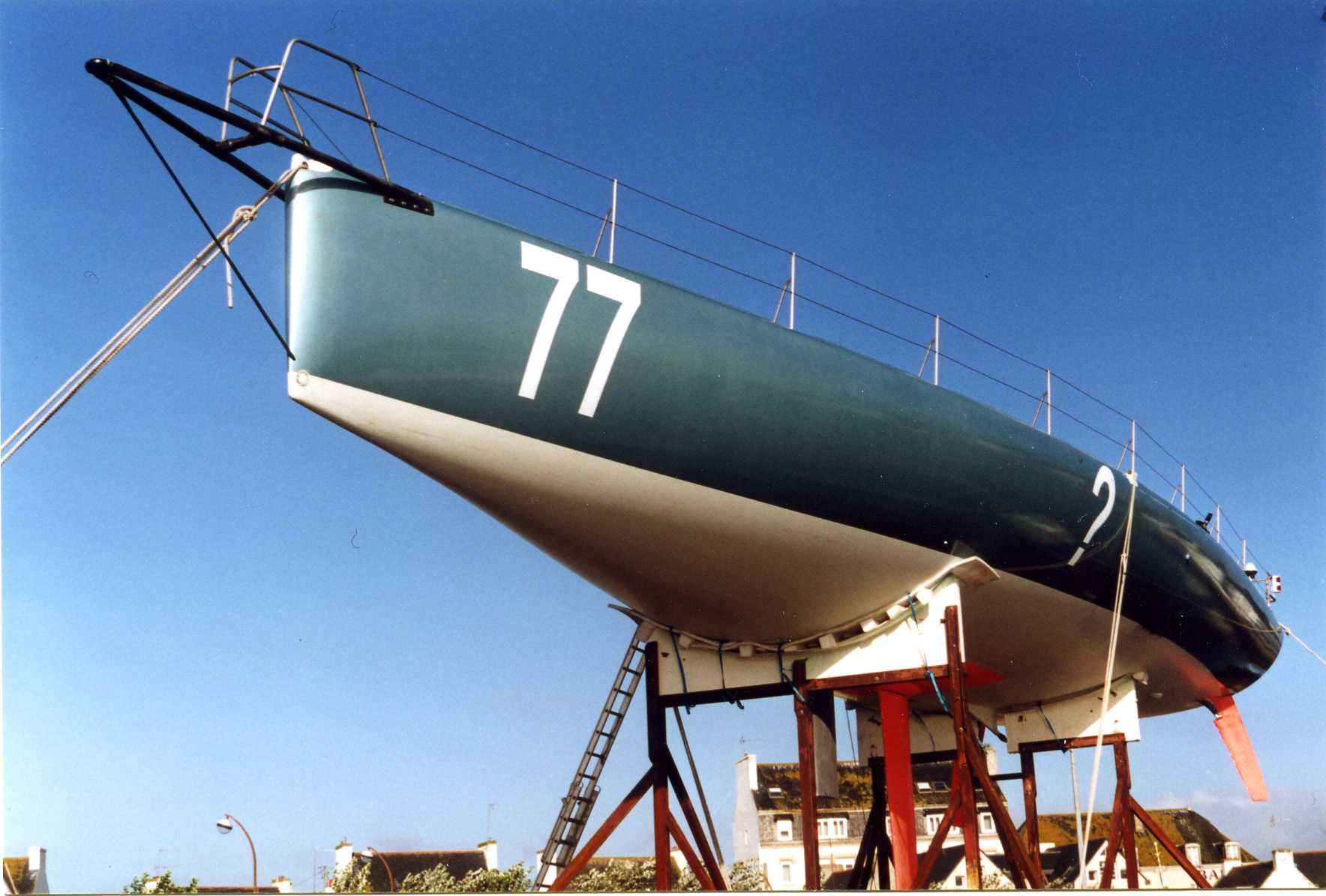 Le 60 pieds Open de Bernard Stamm, "Superbigou", en chantier sur le port de Lesconil, avant sa mise à l'eau le 11 février 2000.